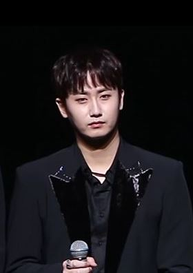 [TV10] 12월 8일 SS301 미니앨범 'ETERNAL 0,1' 쇼케이스 현장